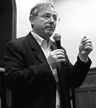 L'historien et écrivain Reynald Secher à la Maison du Diocèse de Vannes, en France, le 8 mars 2012, lors de sa conférence " Vendée du génocide au mémoricide ".